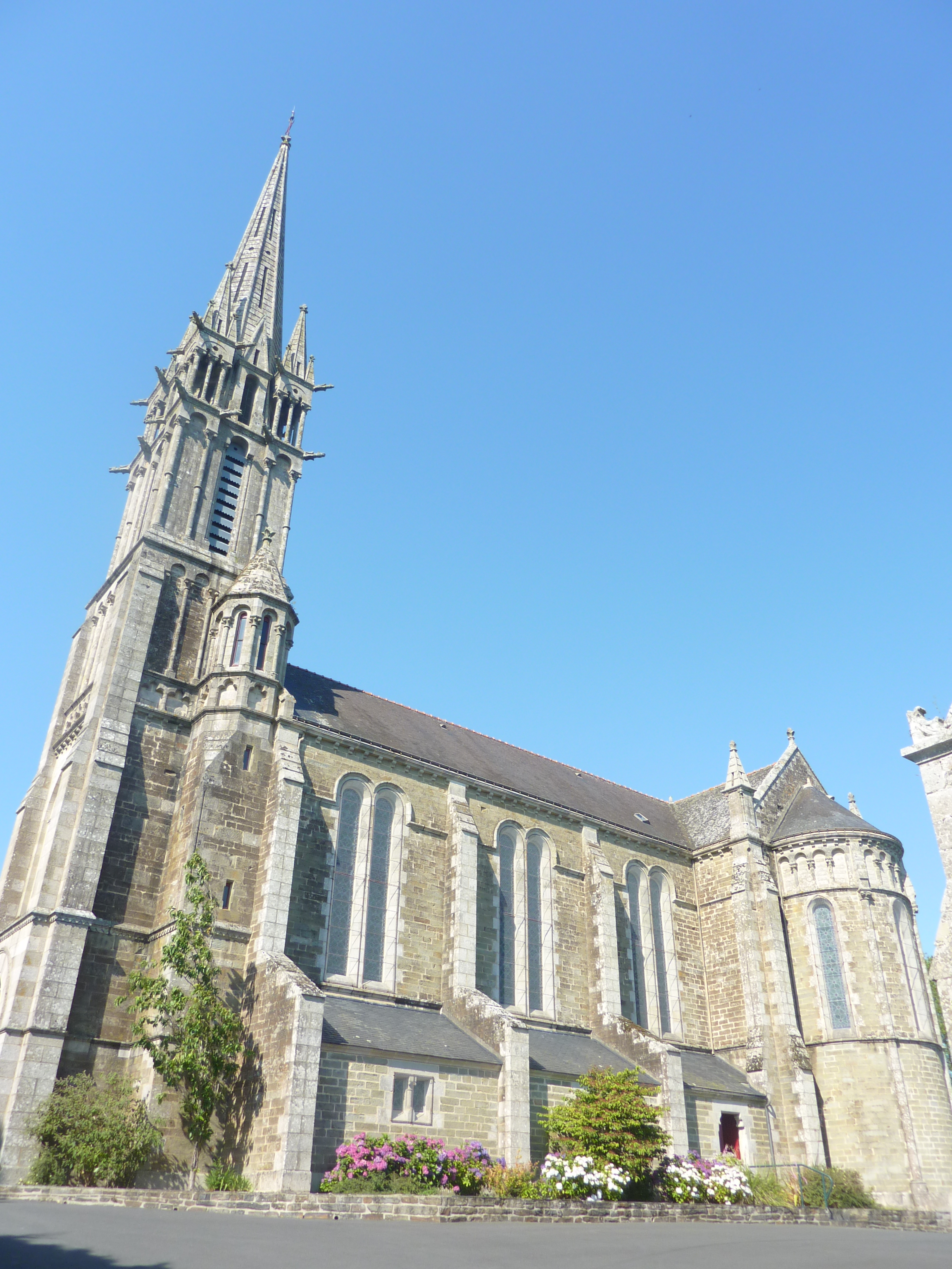 Châteauneuf-du-Faou : Chapelle Notre-Dame-des Portes, façade